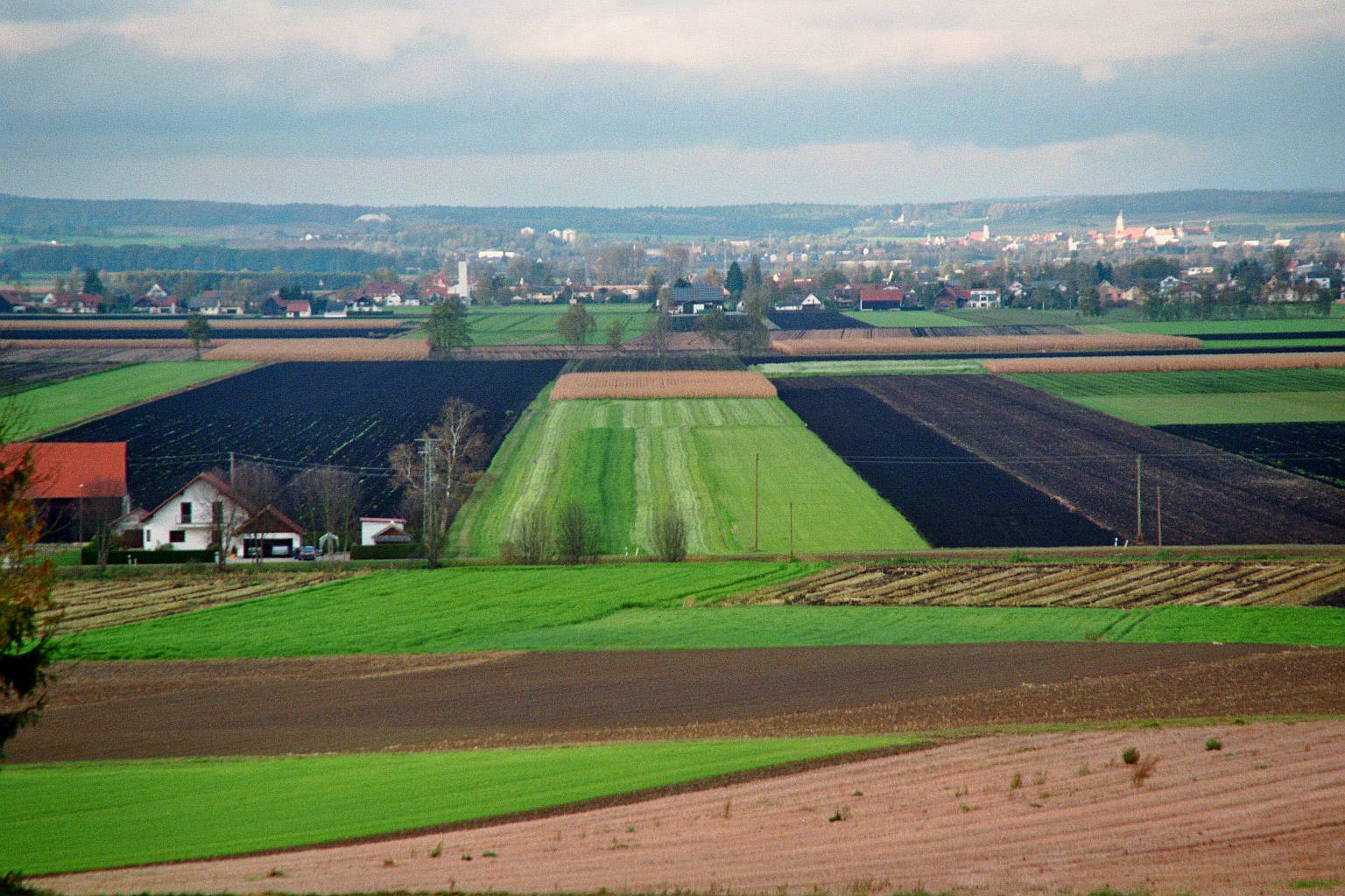 Blick ins Donaumoos, nahe dem Donaumoos-Denkmal in Berg im Gau, Landkreis Neuburg-Schrobenhausen, Bayern, Deutschland.